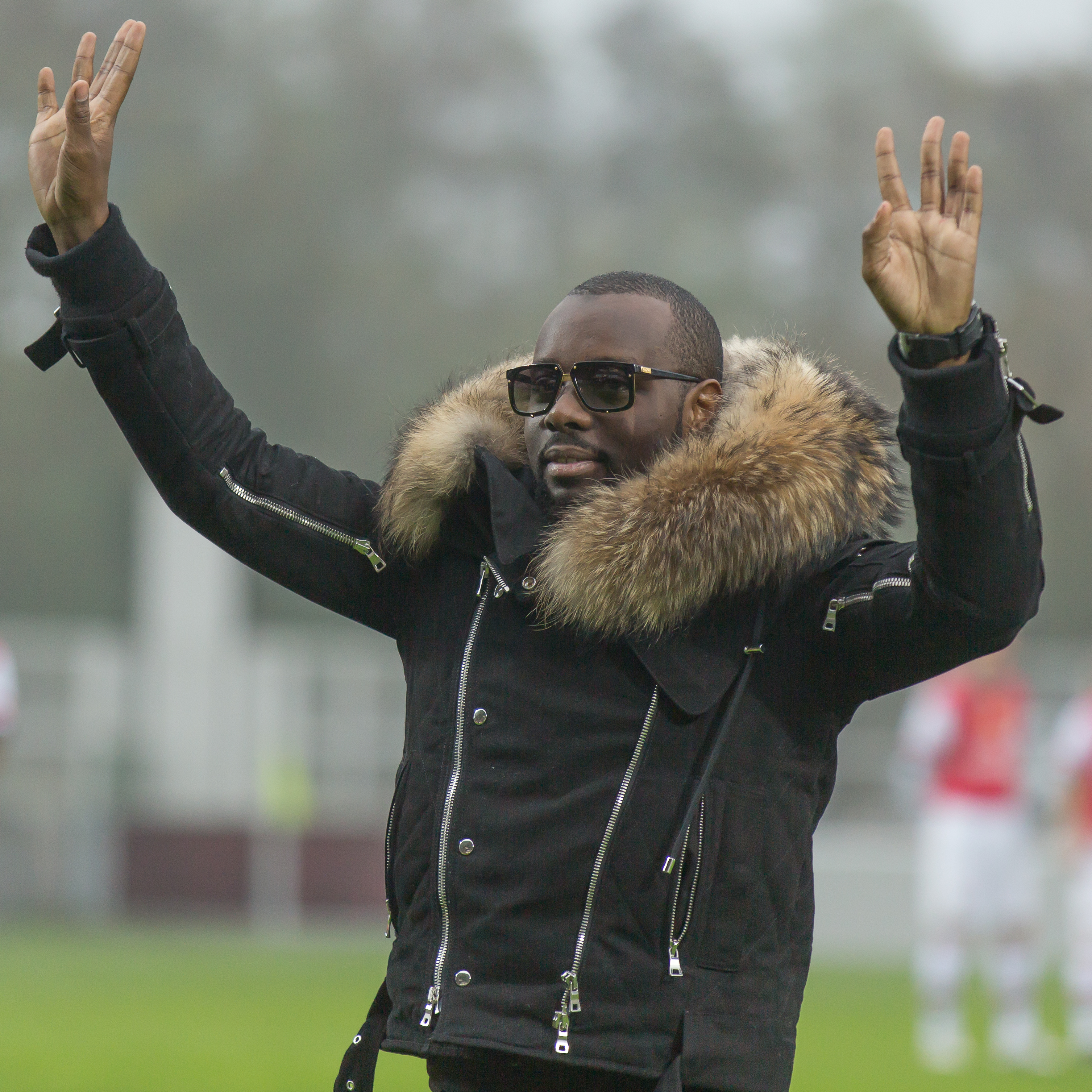 Maître Gims (Gandhi Djuna)